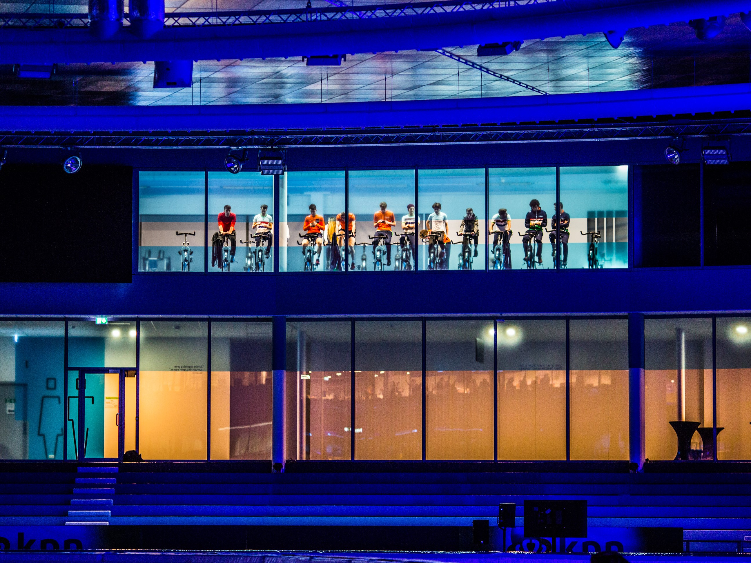 Topsport Thialf - CTO